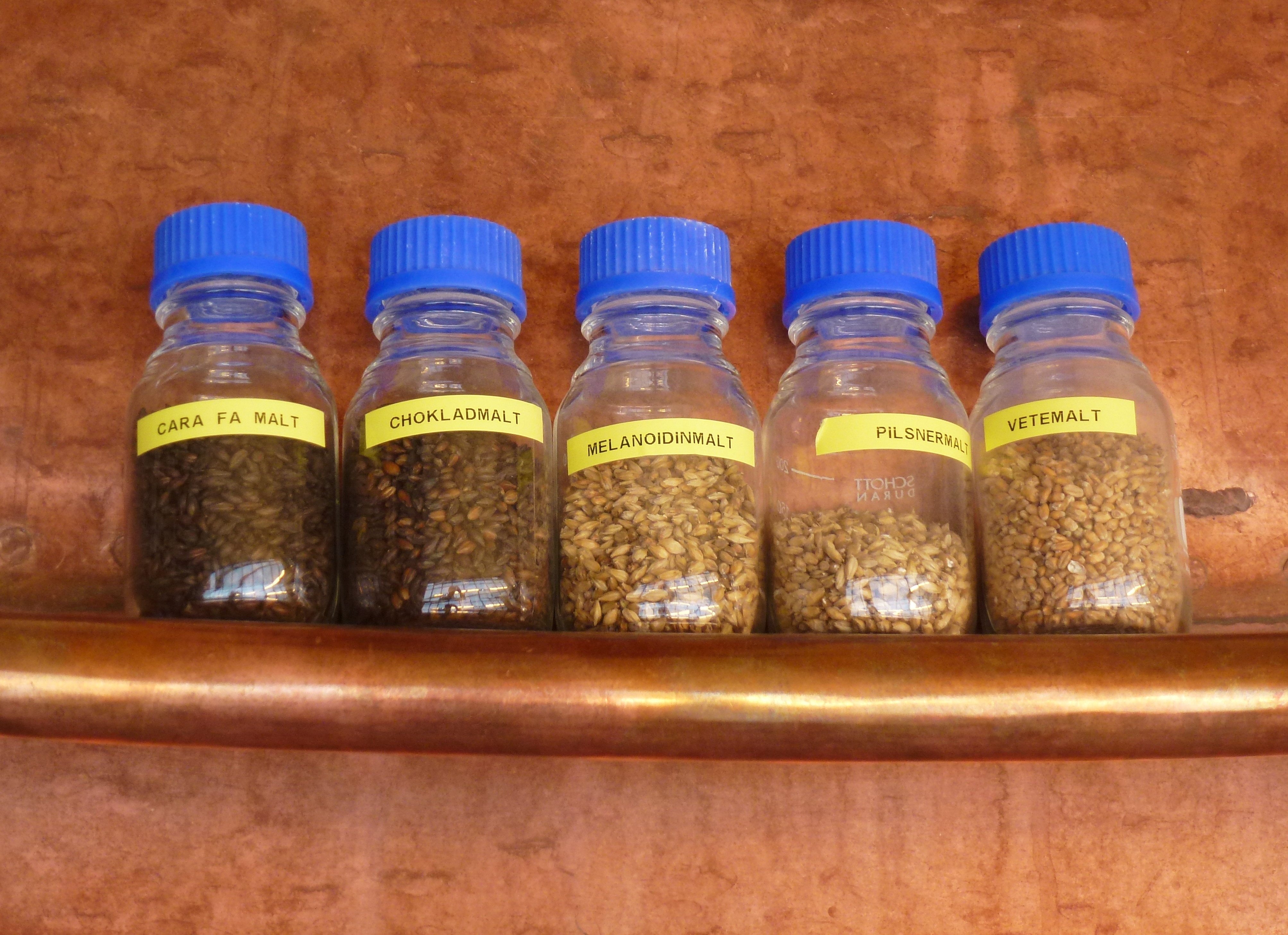 Brygghuset, Vårby bryggeri vörtpanna, maltsorter